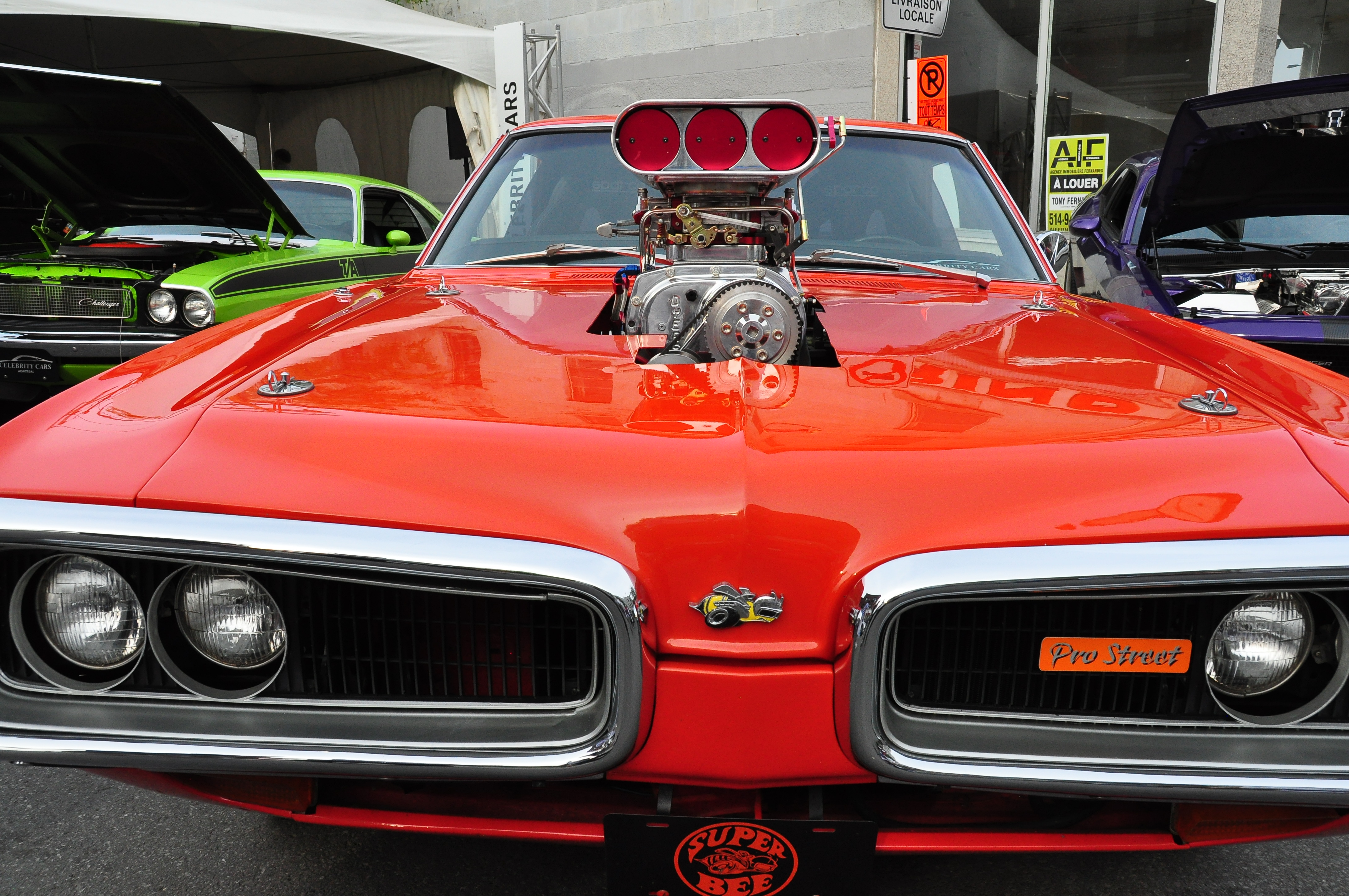 TW Steel Grand Prix weekend 2011